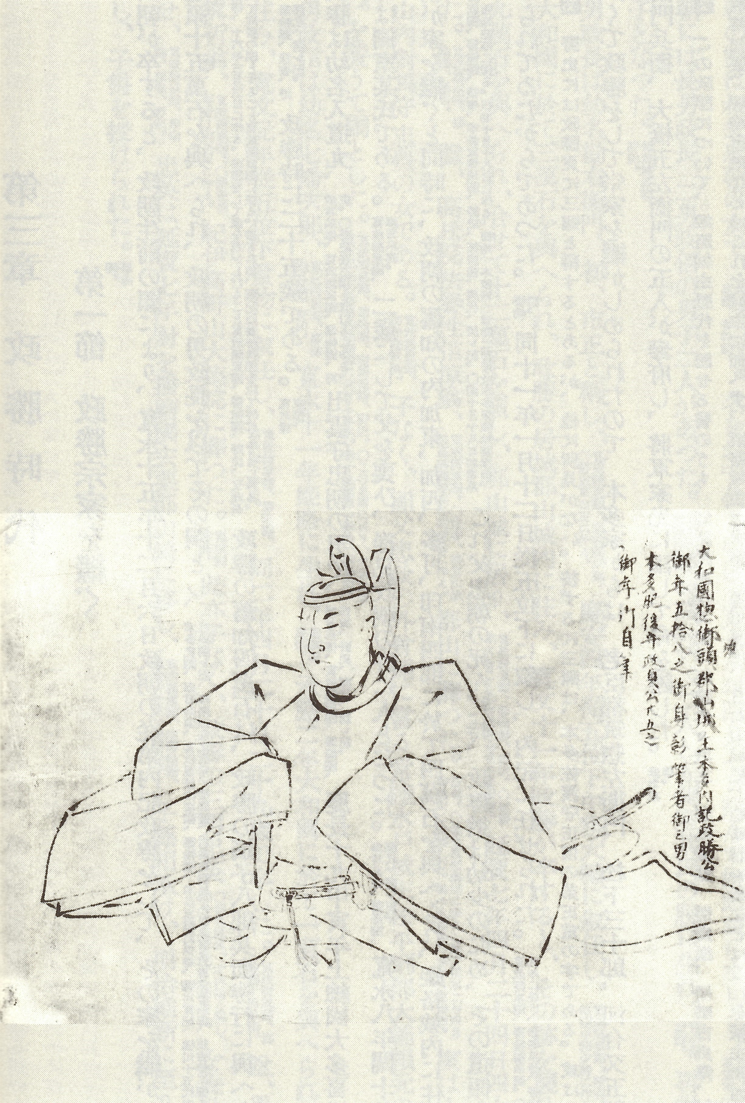 本多政勝の肖像。